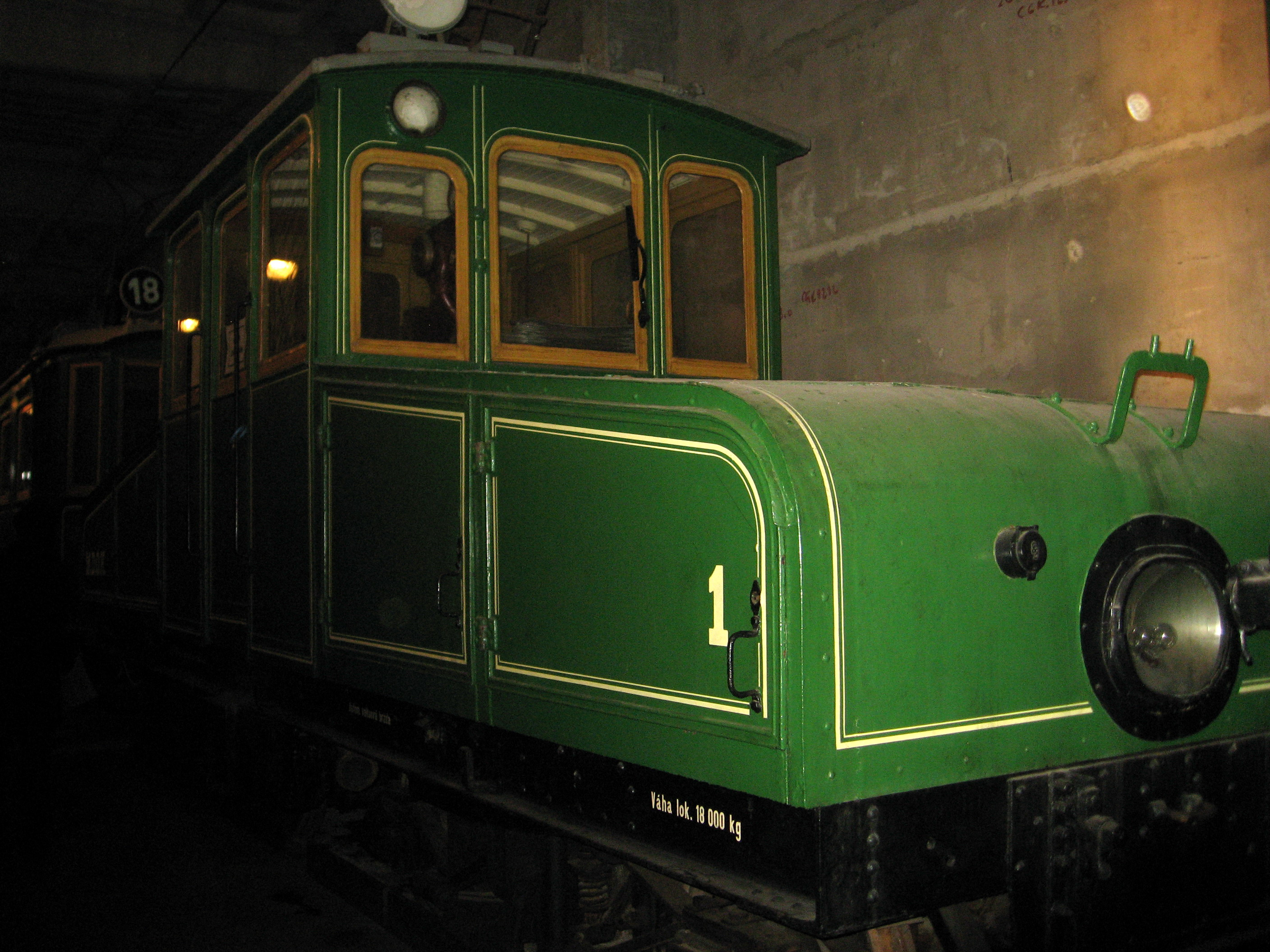 Úzkorozchodná elektrická lokomotiva ev. č. 1 Místní dráhy Ostrava – Karviná, rok výroby 1908, výrobce Graz – exponát Technického muzea v Brně, depozitář MHD v Líšni